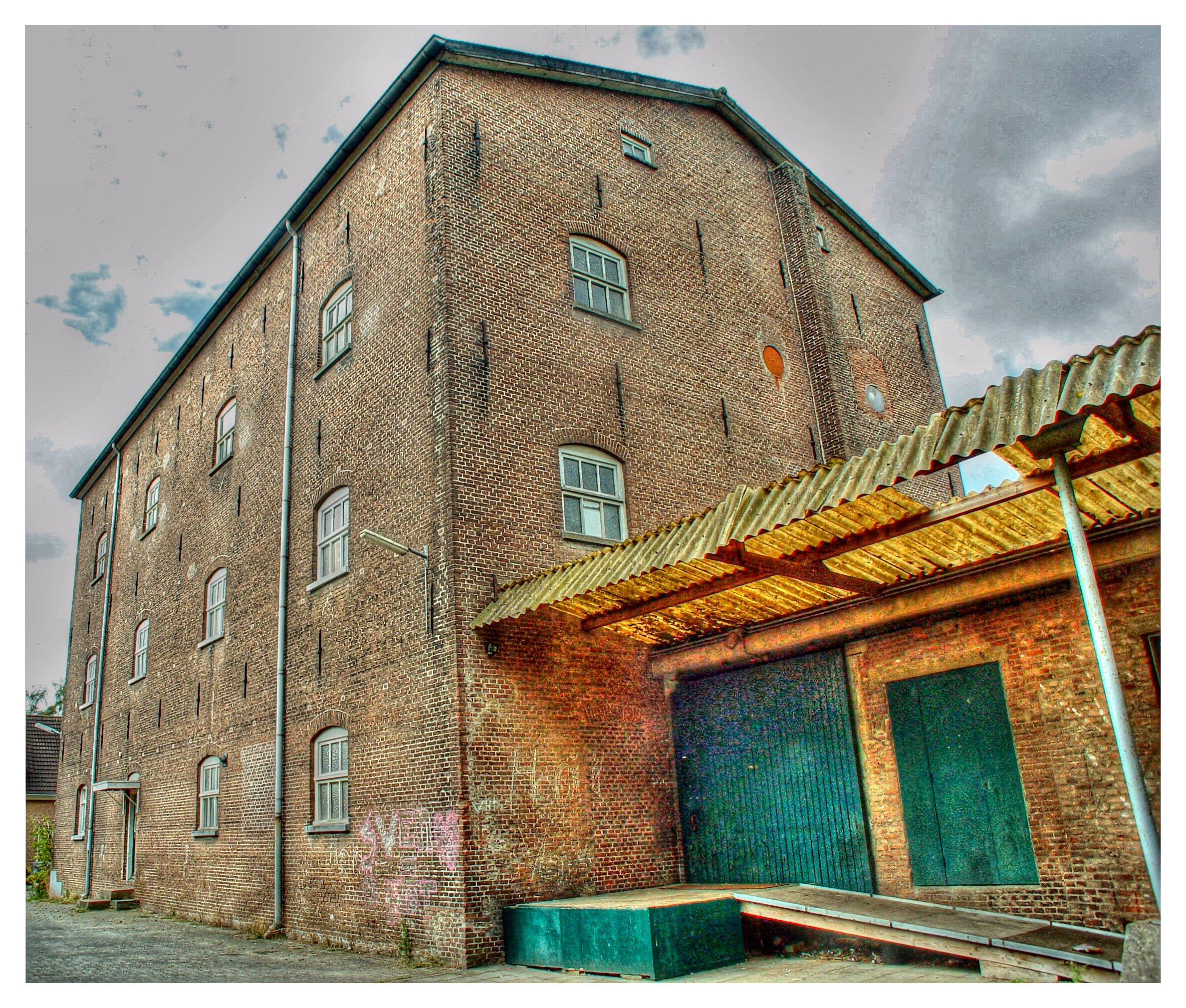 Tabaksmagazijn Druten Website Tabaksmagazijn Druten